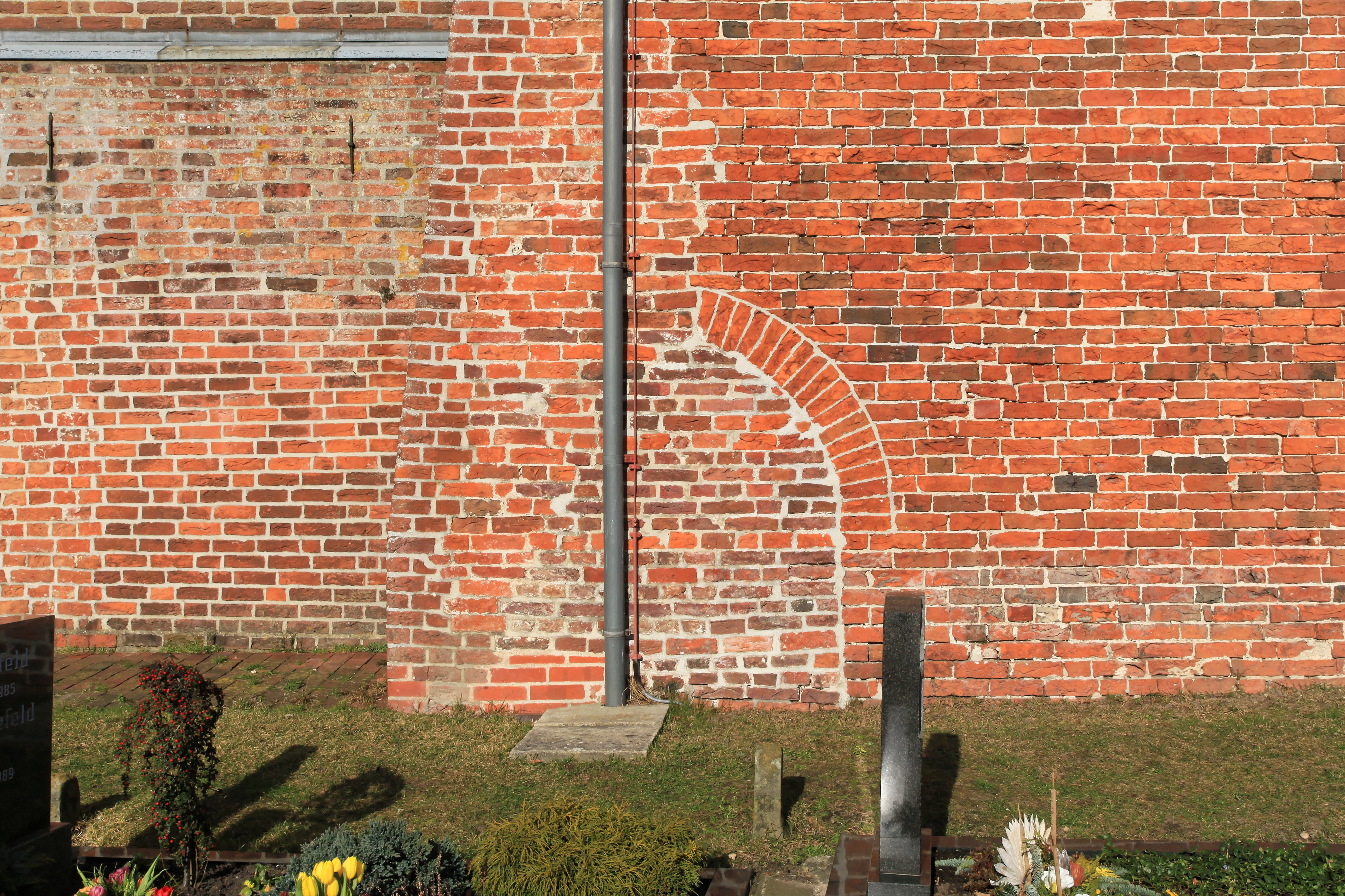 Kirche St. Laurentius und St.Vincentius, Groot Karkweg in Rhauderfehn